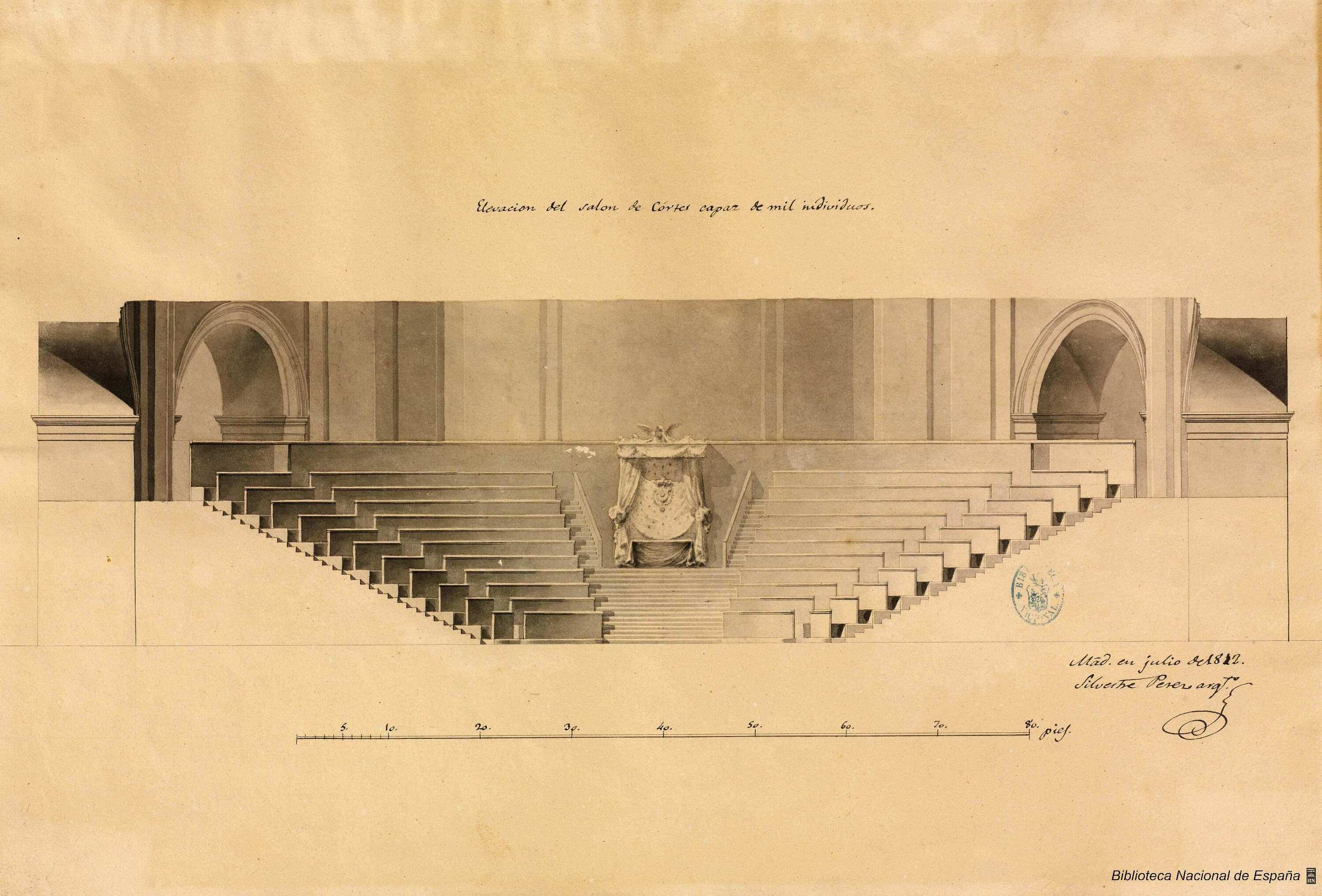 Proyecto de remodelación de la Iglesia de San Francisco para Salón de Cortes (sección del Salón de Cortes) Autor: Pérez, Silvestre (1767-1825)